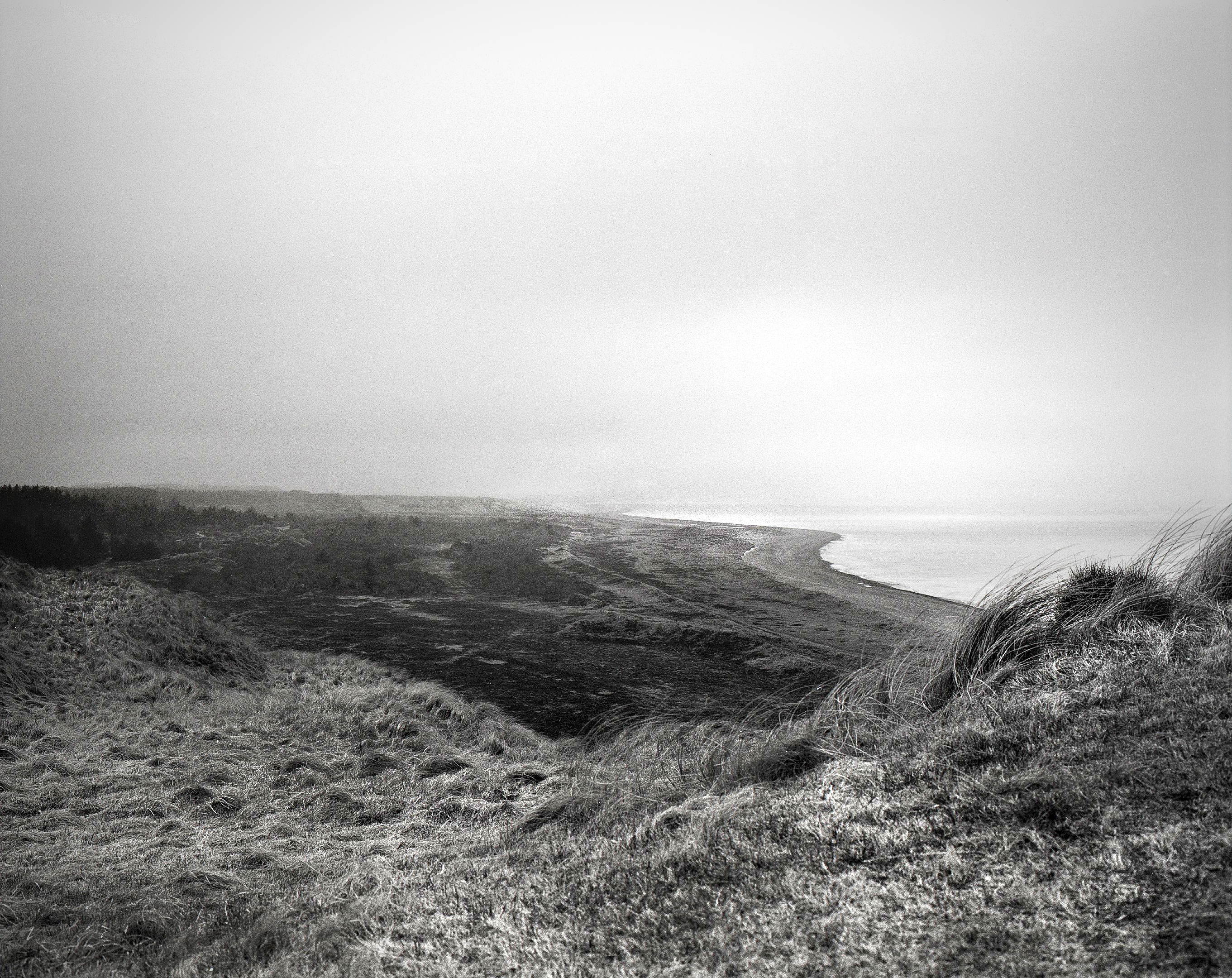 Jammerbucht Dänemark